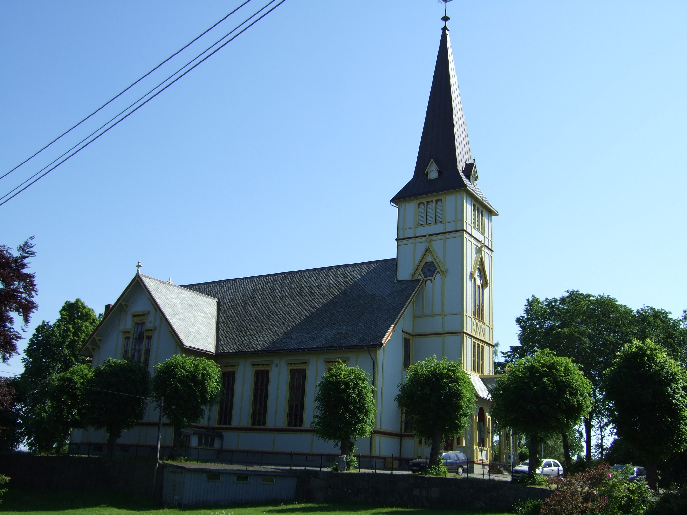 Grimstad church, Norway